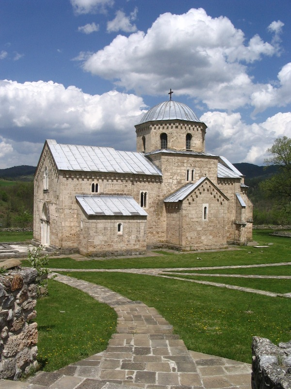 Manastir Gradac